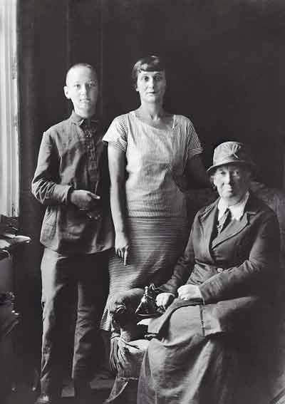 Лев Гумилёв с матерью Анной Ахматовой и бабушкой А. И. Гумилёвой. Середина 1920-х гг.